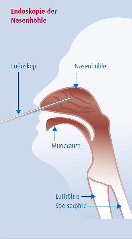 Schaubild Sinuskopie